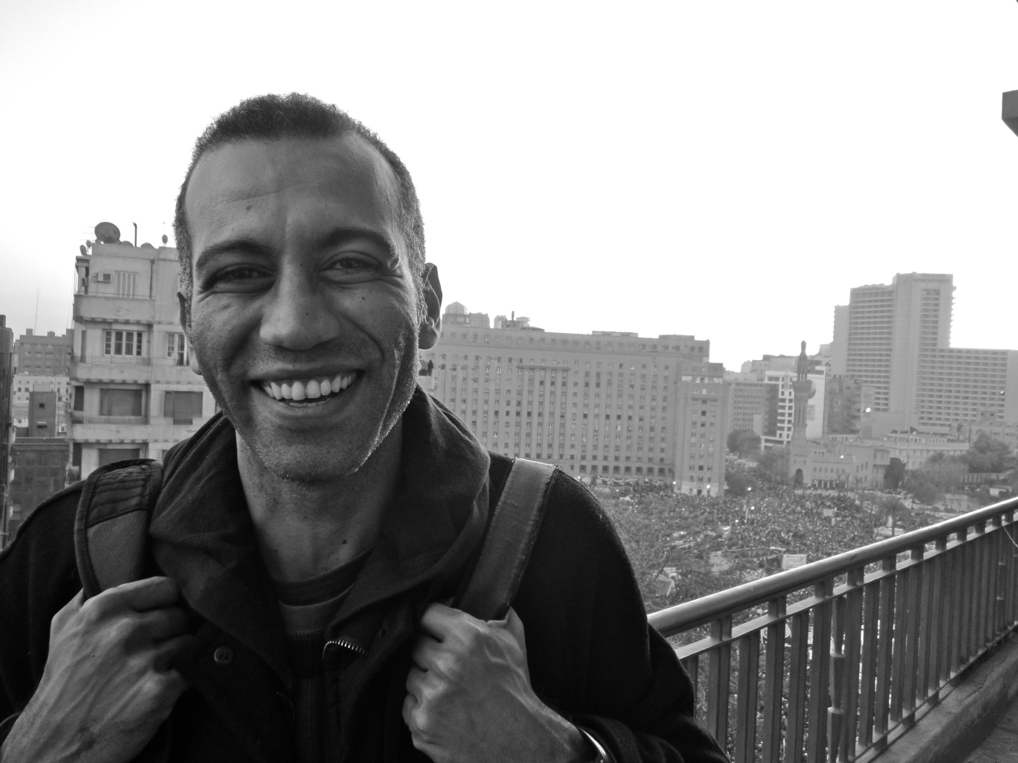 @3arabawy - Hossam